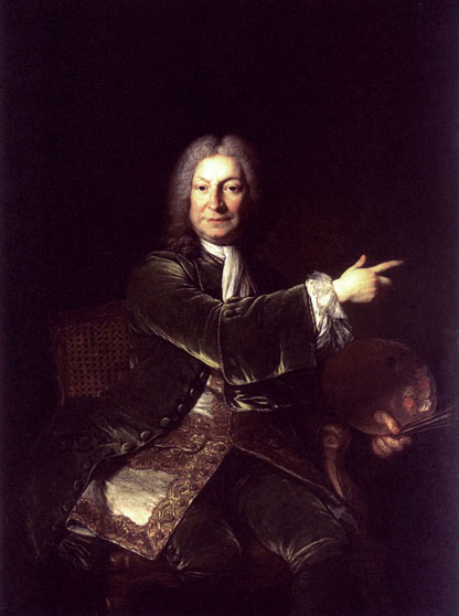 Portrait of Robert Tournières (1667-1752)